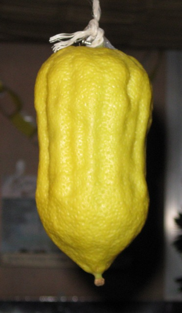 Moroccan Citron